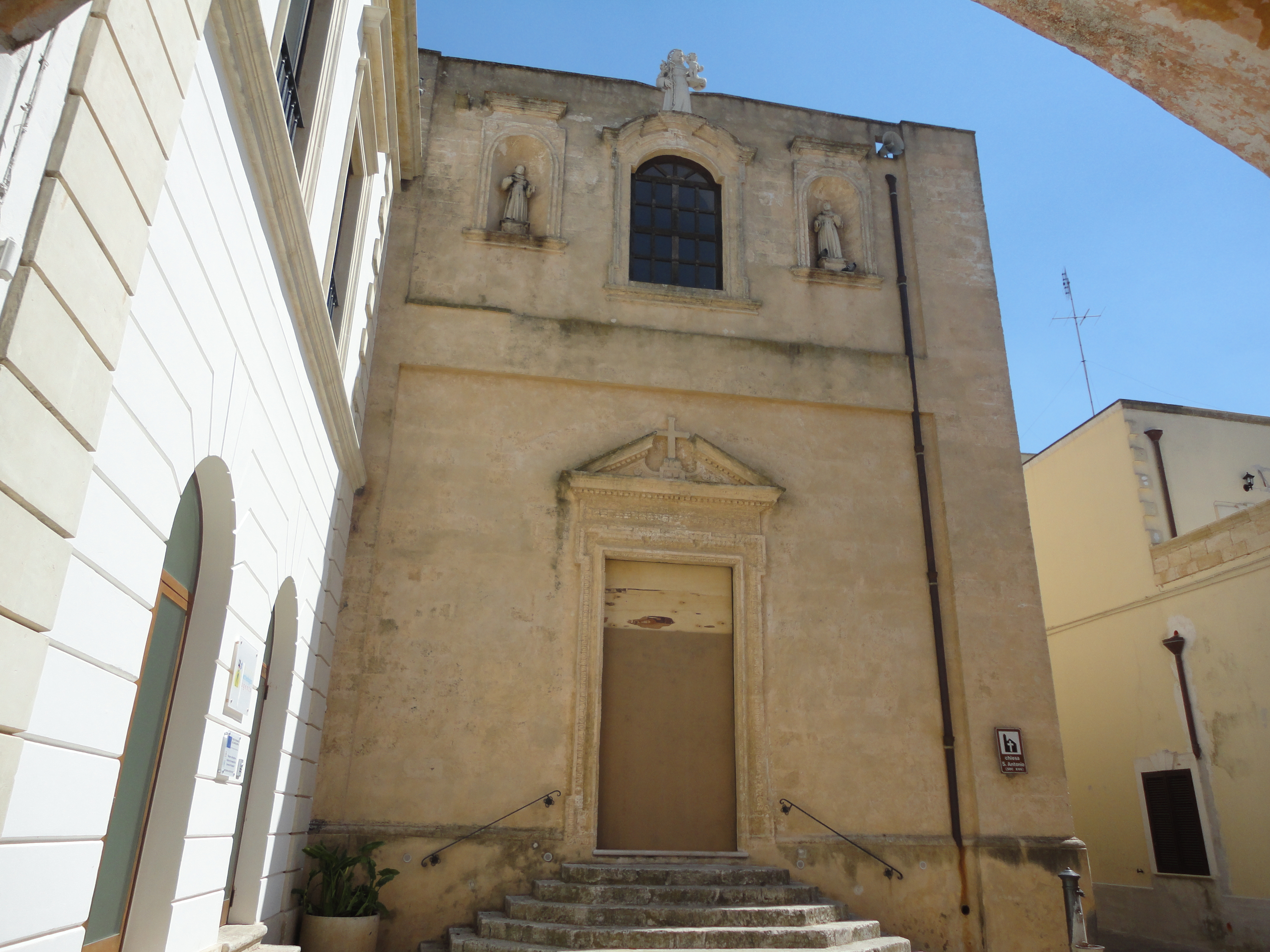 Chiesa di Sant'Antonio da Padova Ugento, Lecce